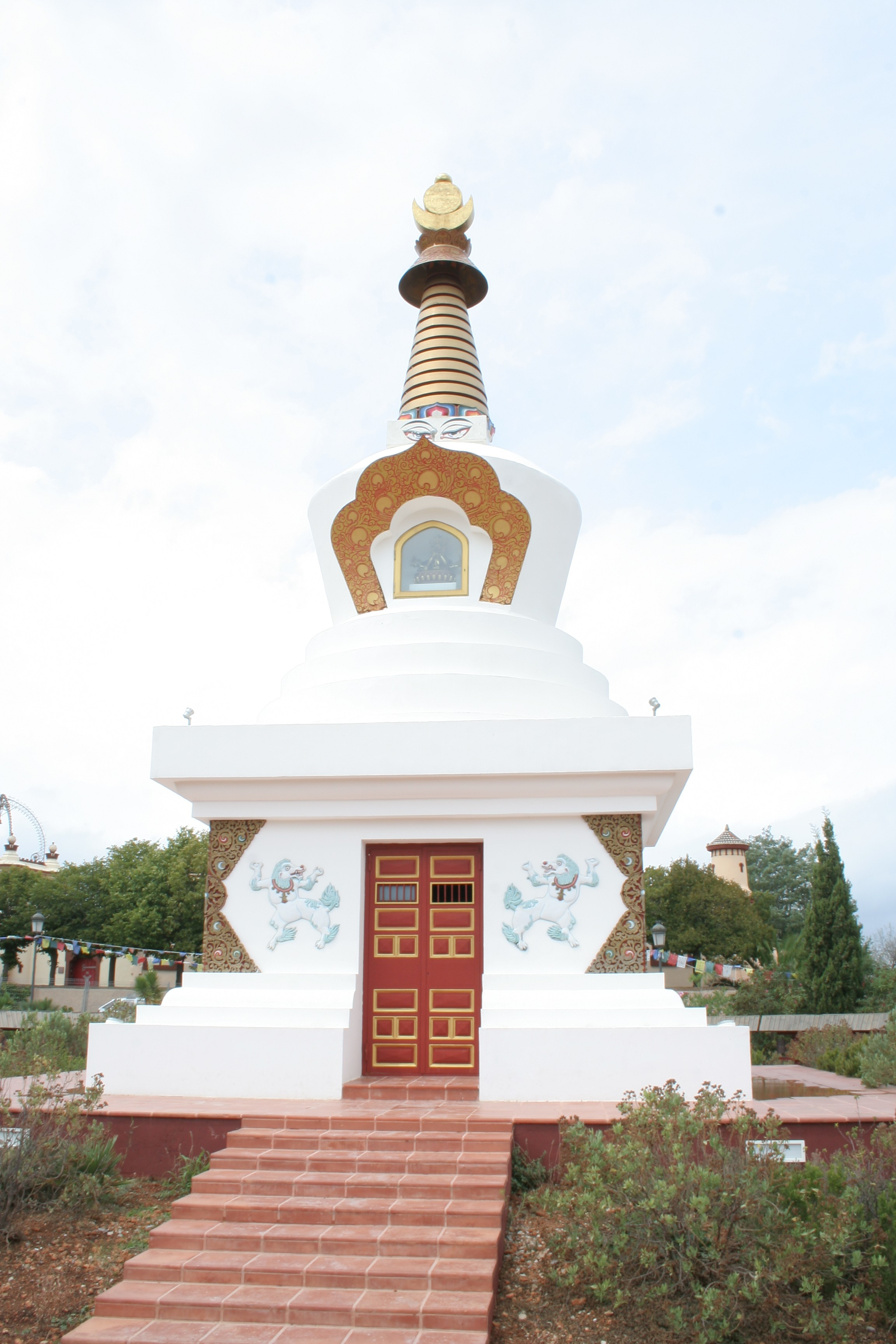 Monestir budista a Olivella, Parc del Garraf